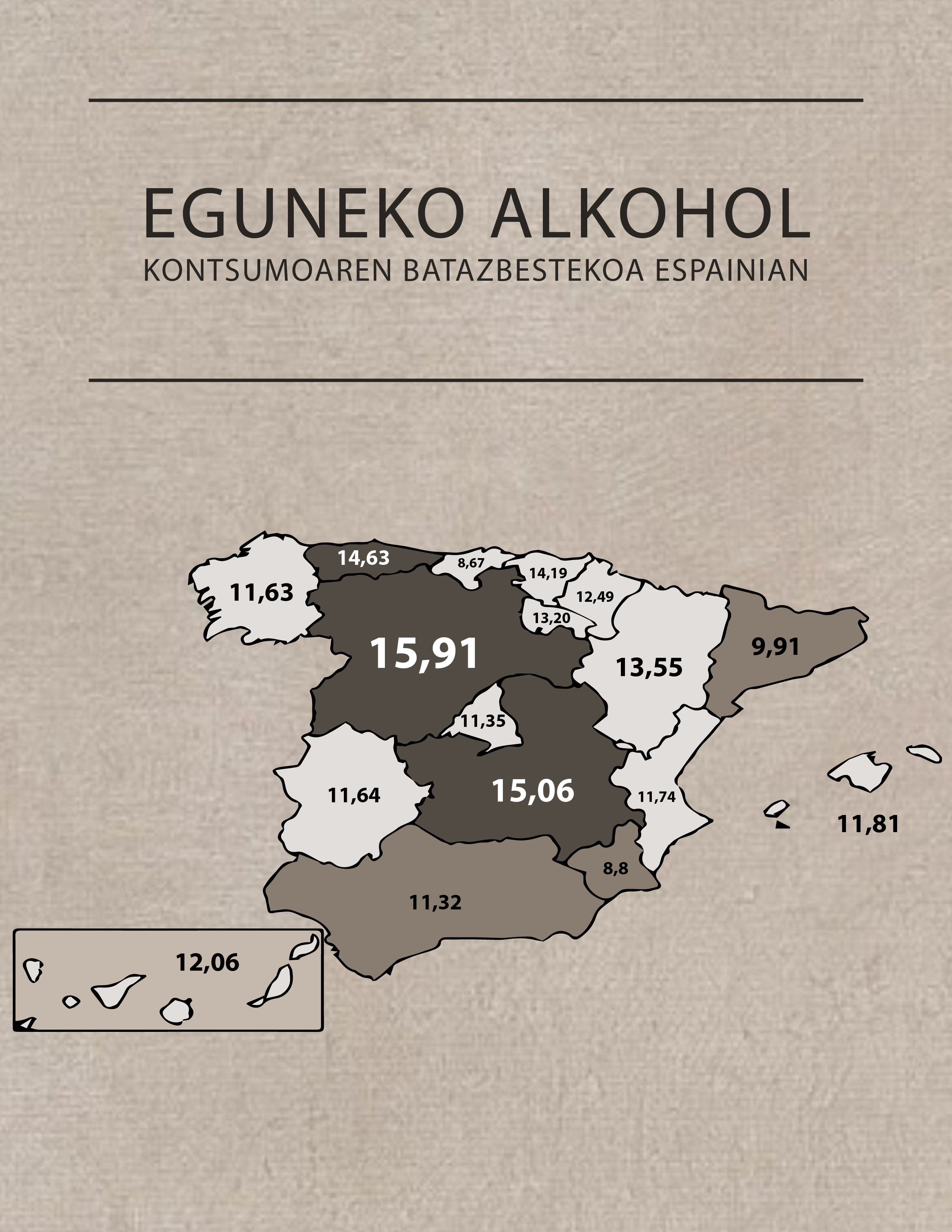 Eguneko alkohol kontsumoaren batazbestekoa espainian